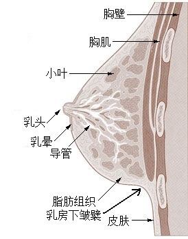 乳房下皱襞